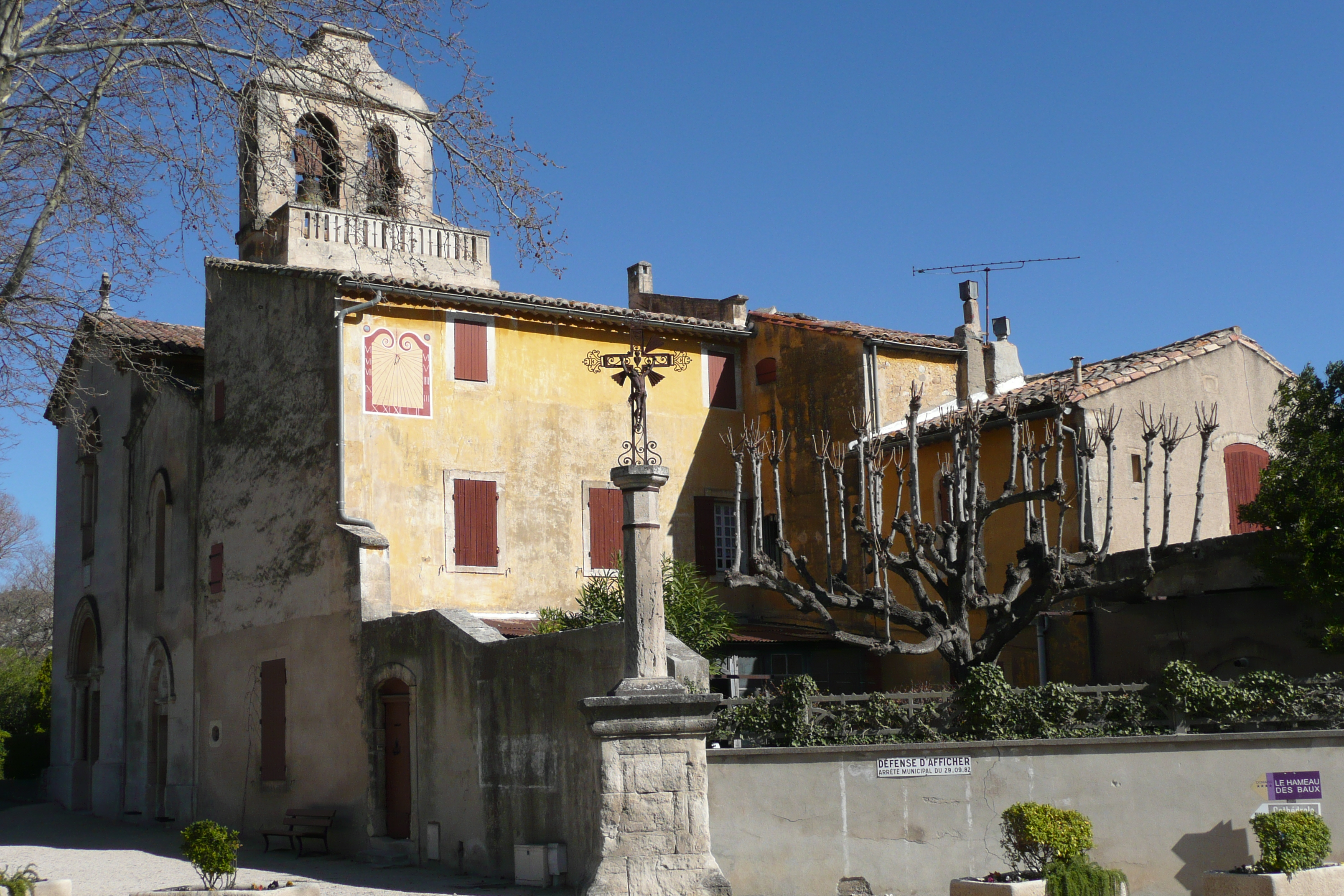 43°43′15.2″N 4°47′10″E / 43.720889°N 4.78611°E